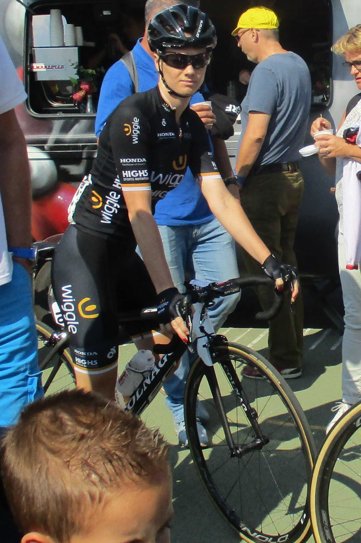 Start van de 6e etappe van de Boels Ladies Tour 2017 op het Tom Dumoulin Bike Park in Sittard-Geleen.